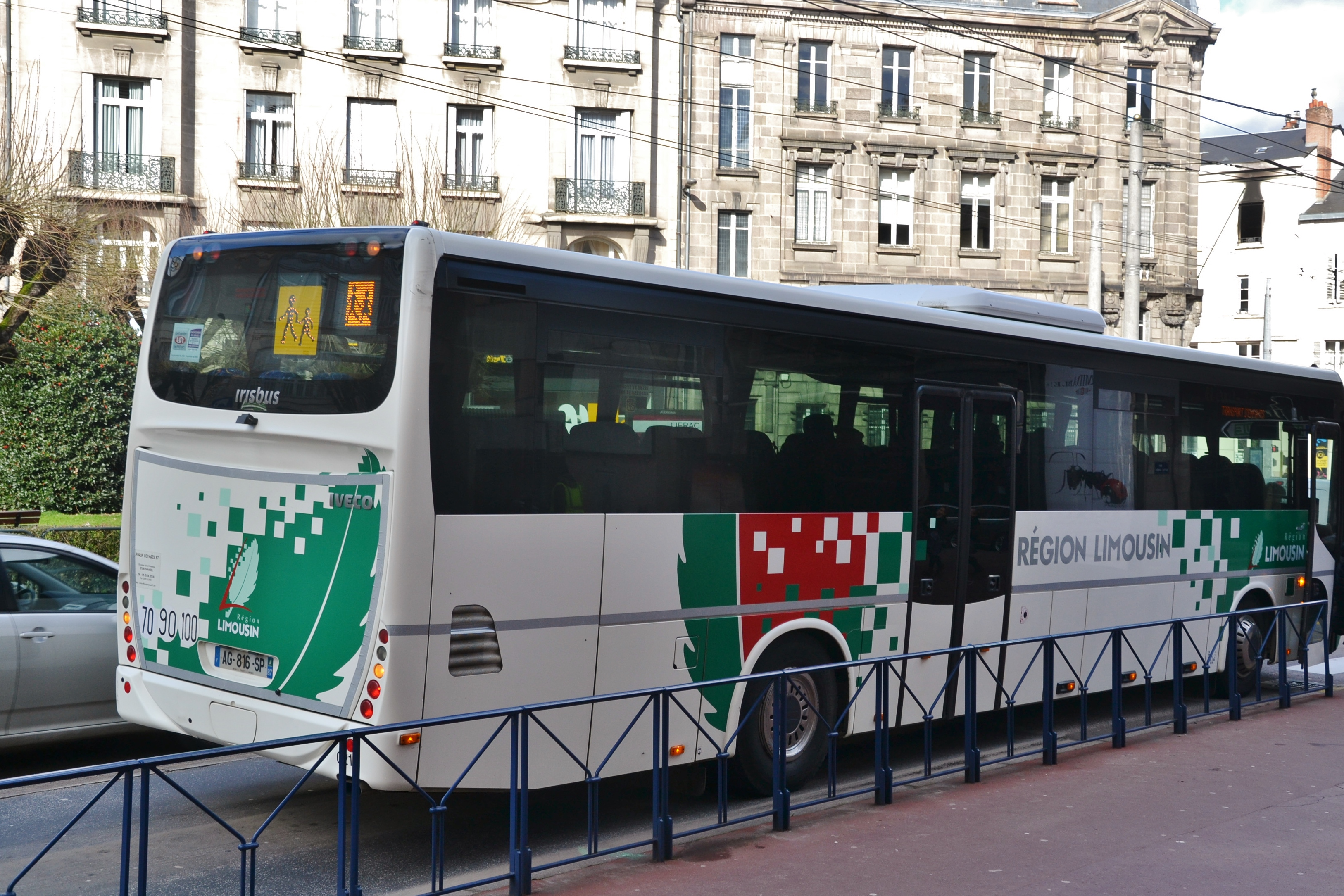 Car scolaire de la région Limousin, place Stalingrad à Limoges (Haute-Vienne, France).